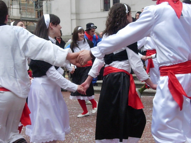 Alcuni ragazzi di Cervinara eseguono la "Zeza", Avellino, Campania (Italy)